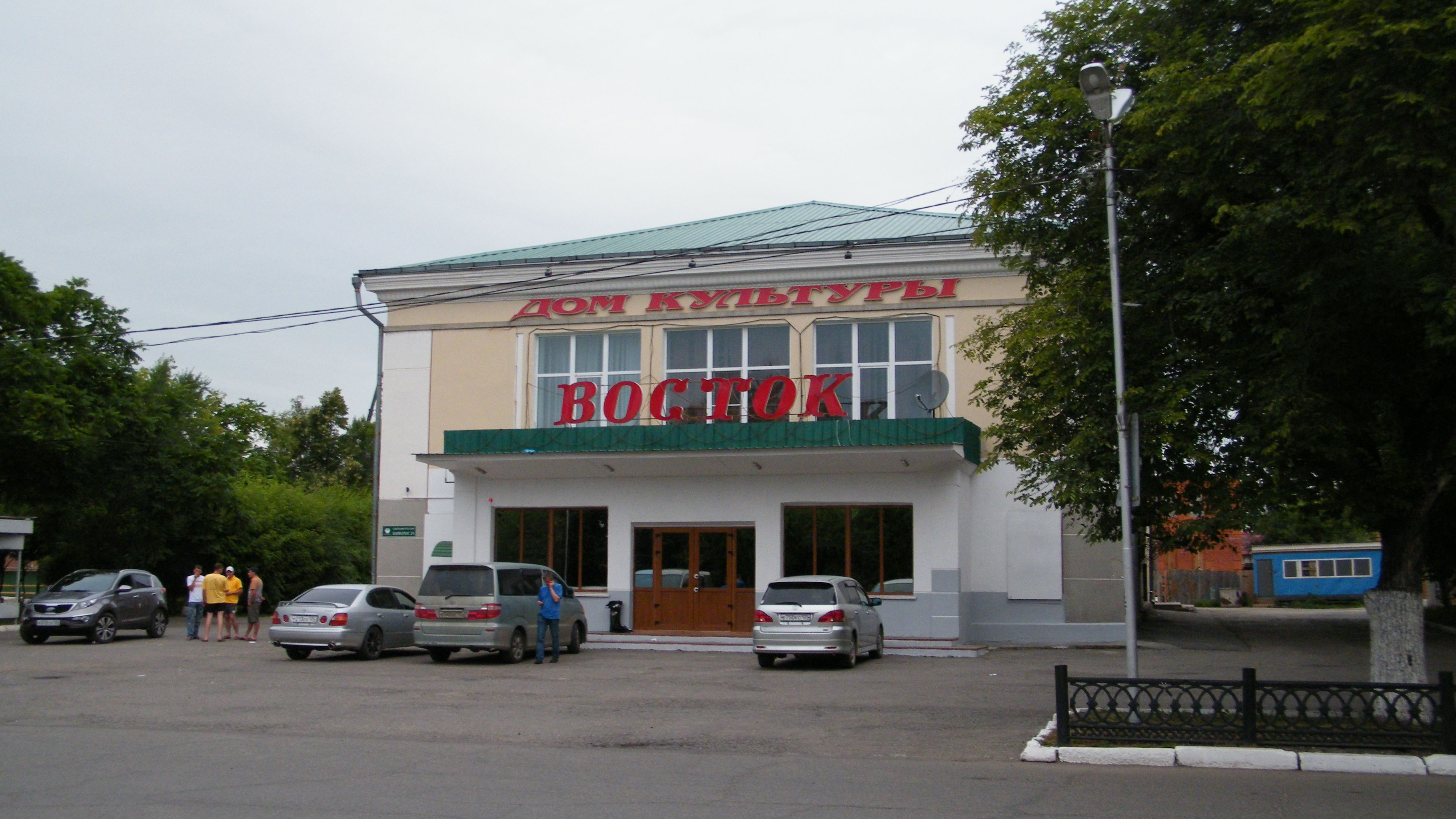 Дальнереченск, дом культуры Восток